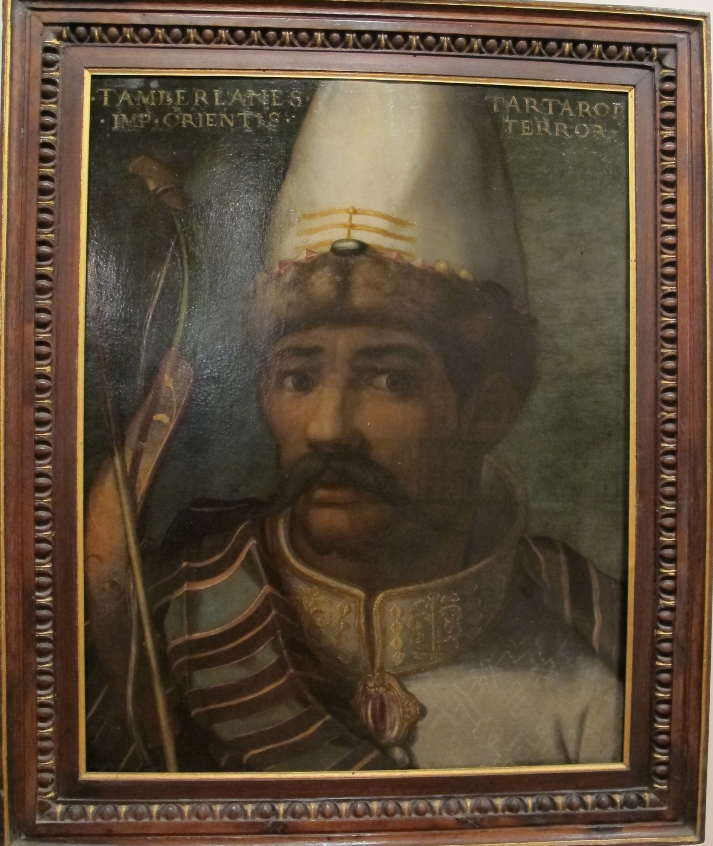 Cristofano dell'altissimo, tamerlano, ante 1568